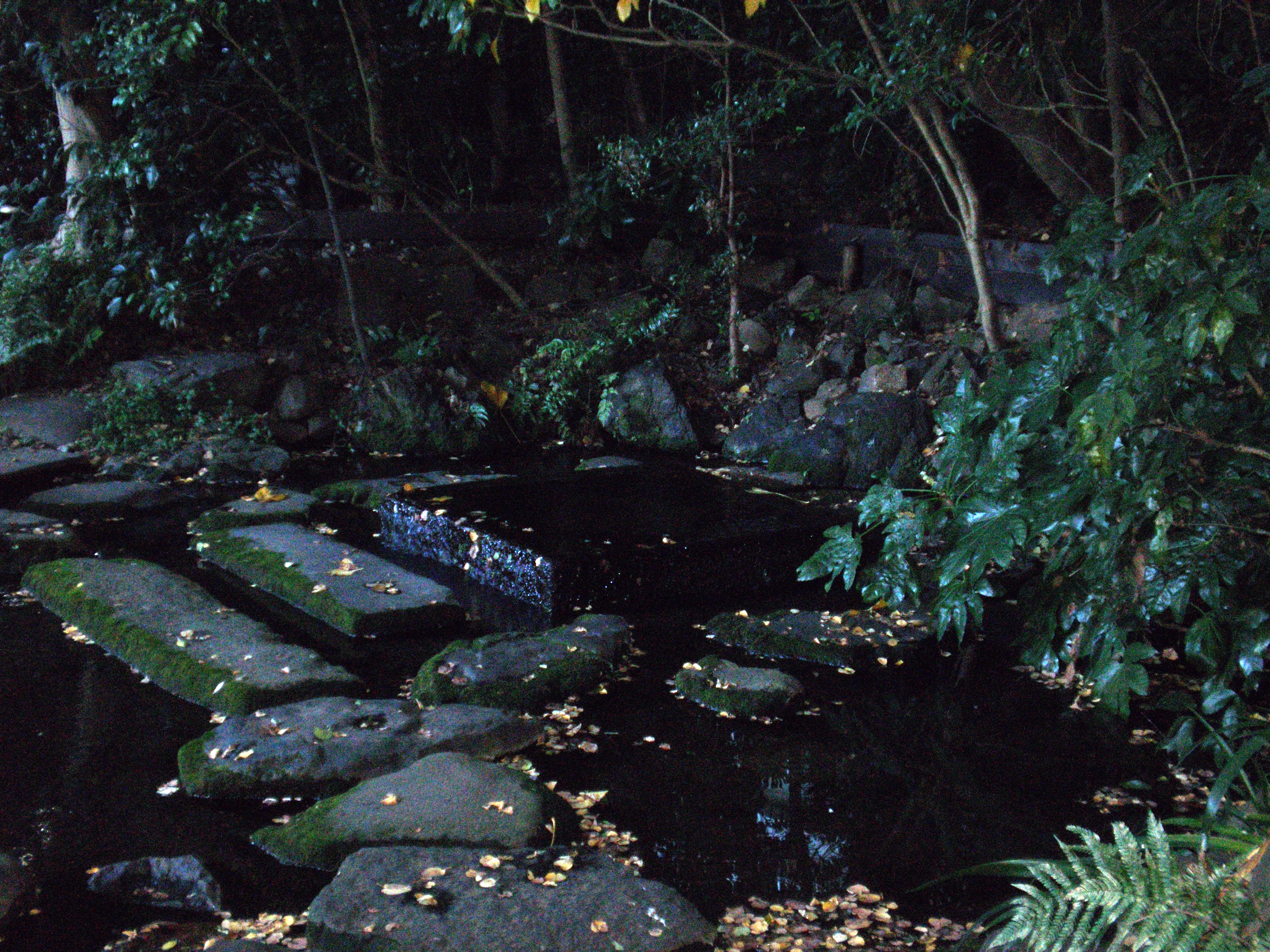 Ochanomizu, Spring at Inokashira Park, Tokyo.